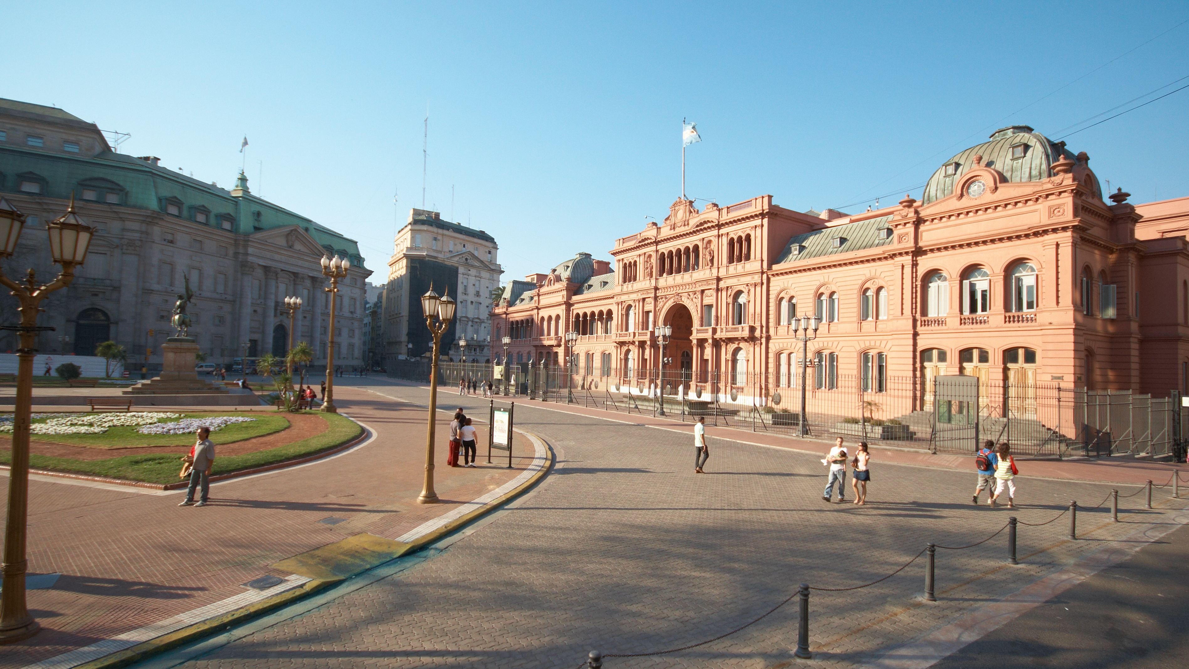 Casa Rosada, Monserrat, Buenos Aires, Argentina.